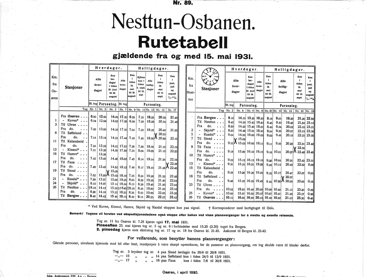 Rutetabell for Nesttun–Osbanen 1931